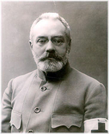 Государственного Совета по выборам, лидер партии "октябристов" А.И.Гучковфото А.И. Гучкова